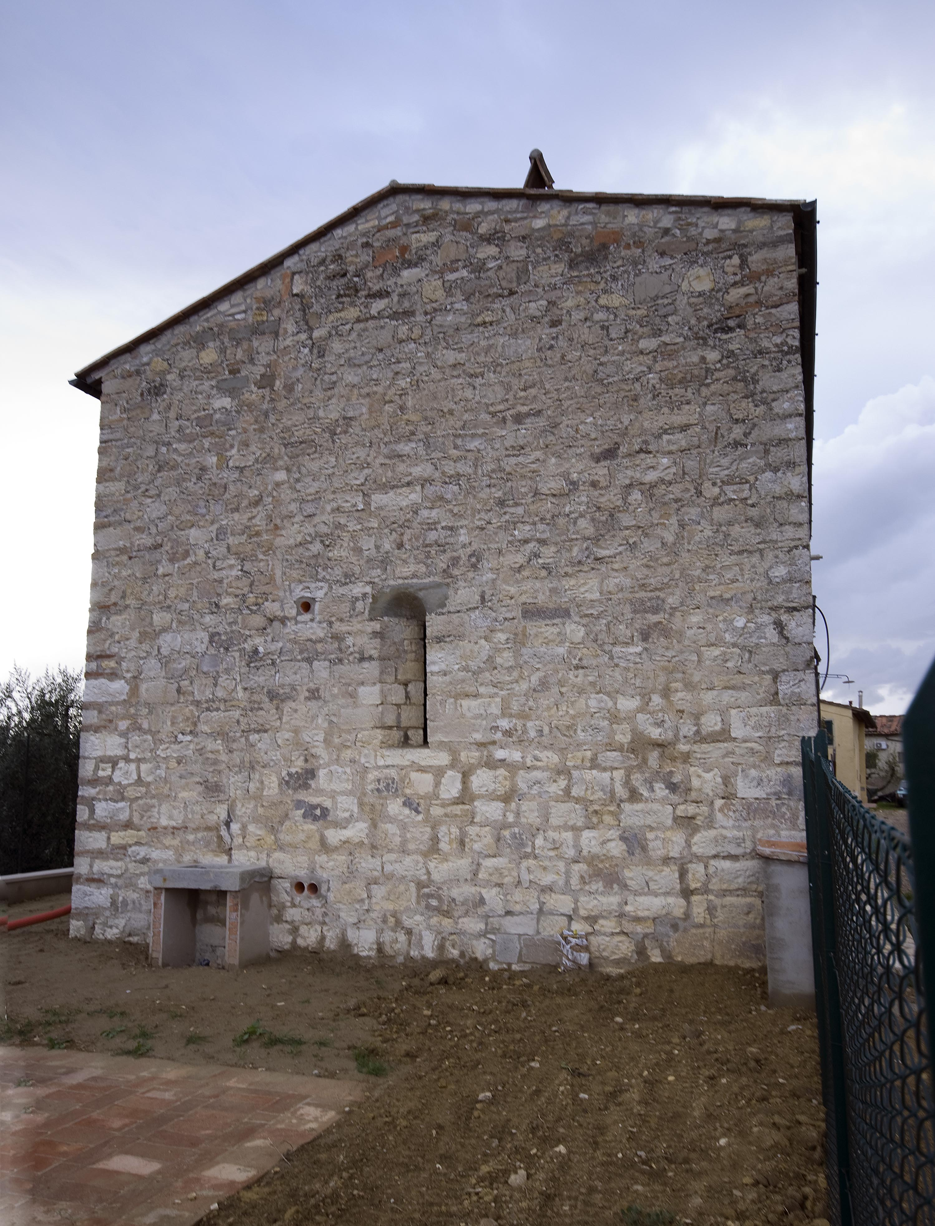 ex chiesa di san niccolò a montecampolesi - Abside - Mercatale in Val di Pesa